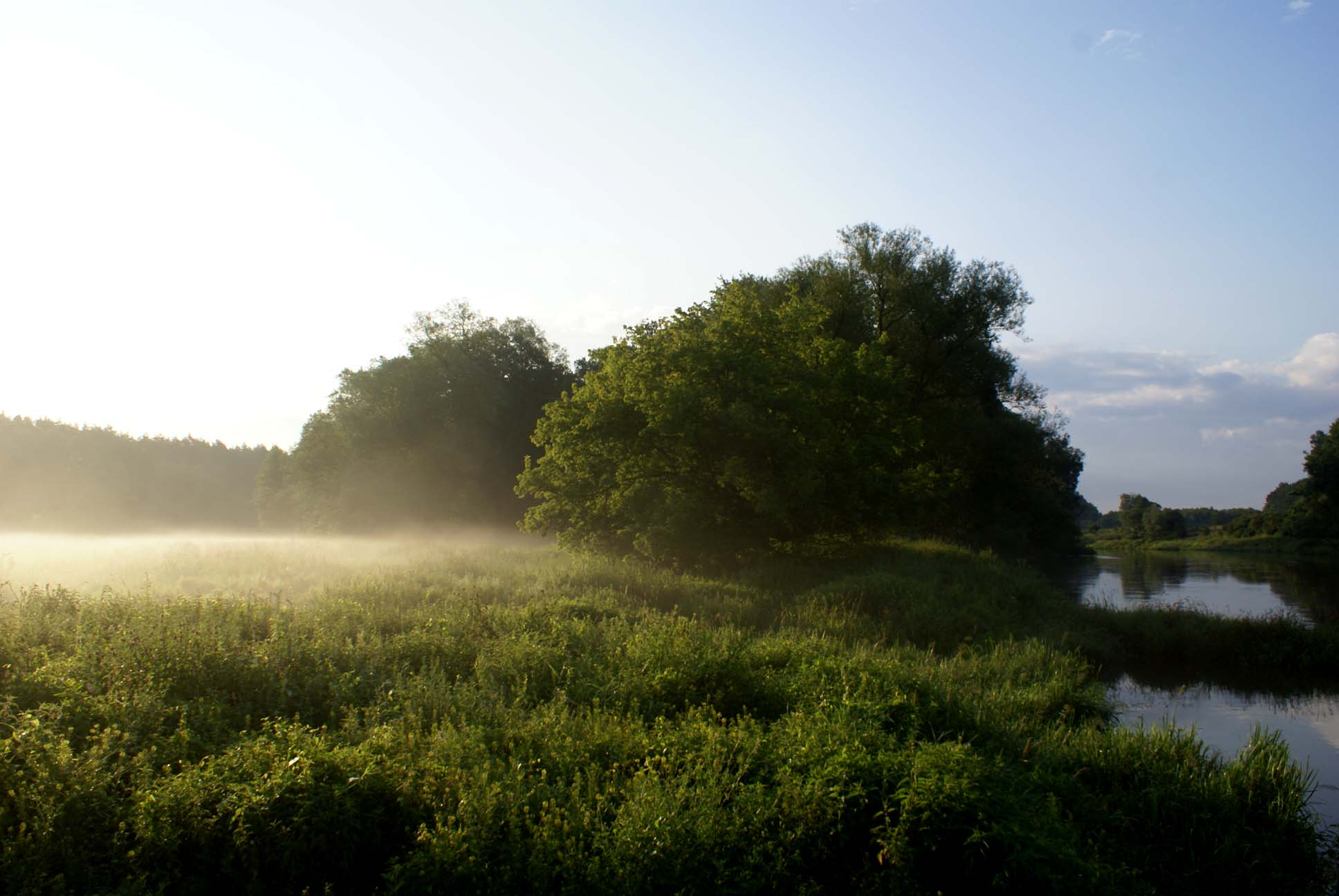 Ostrów Radzimski w porannym lipcowym słońcu.